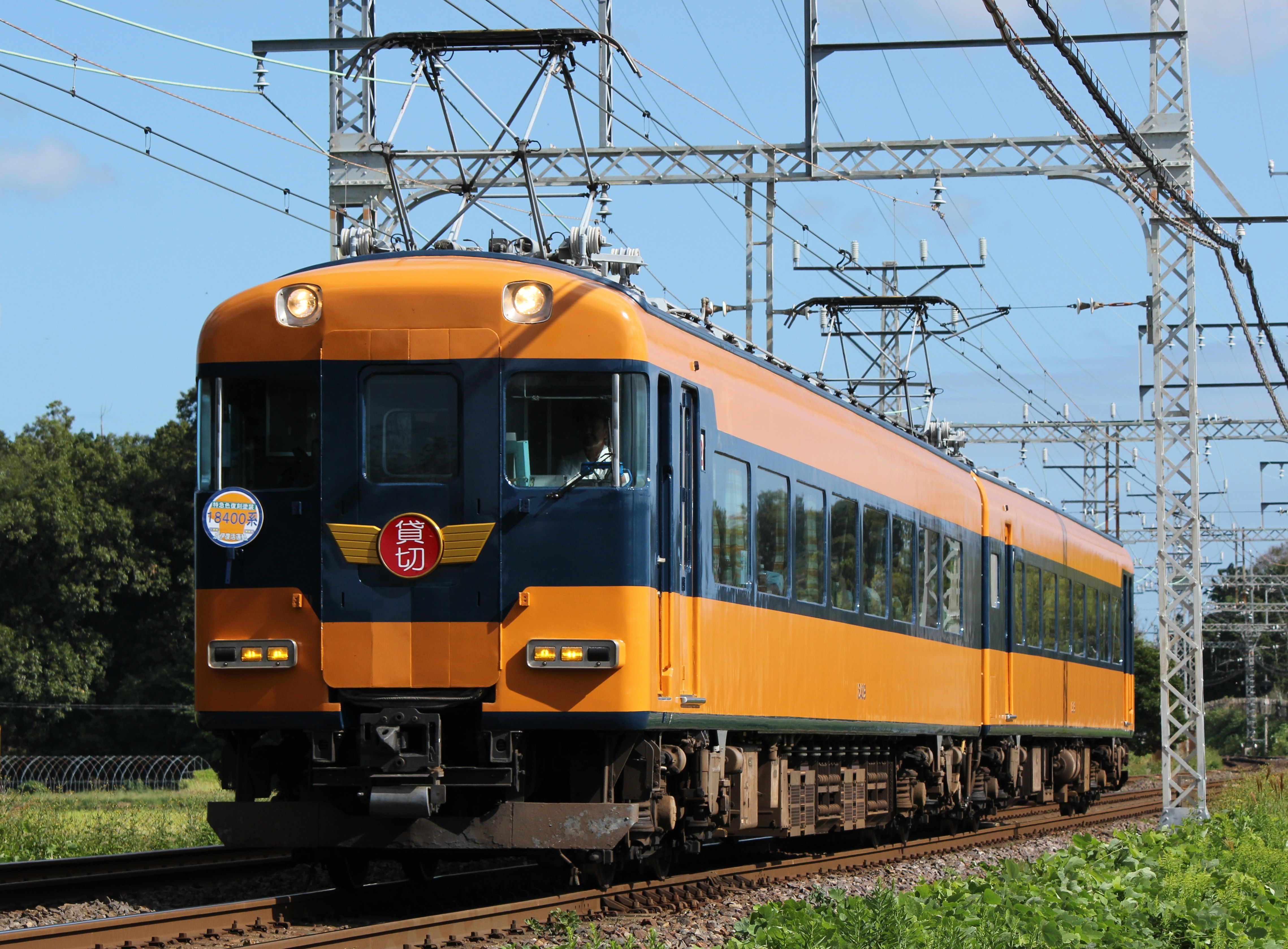 近鉄18400系 2013年10月6日「特急色復刻塗装 京伊復活運転」ツアー 斎宮駅-漕代駅間